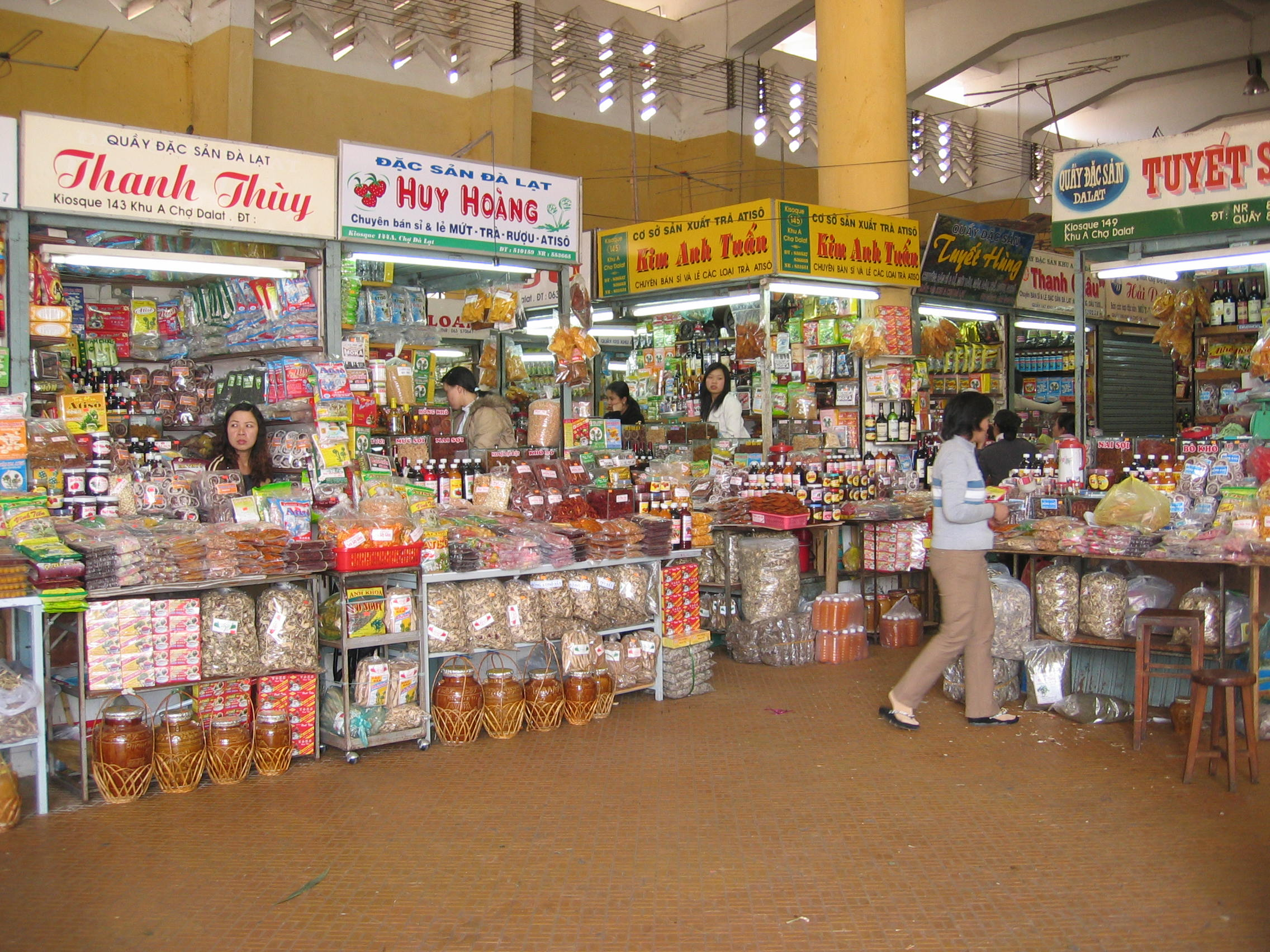 Bên trong chợ Đà Lạt